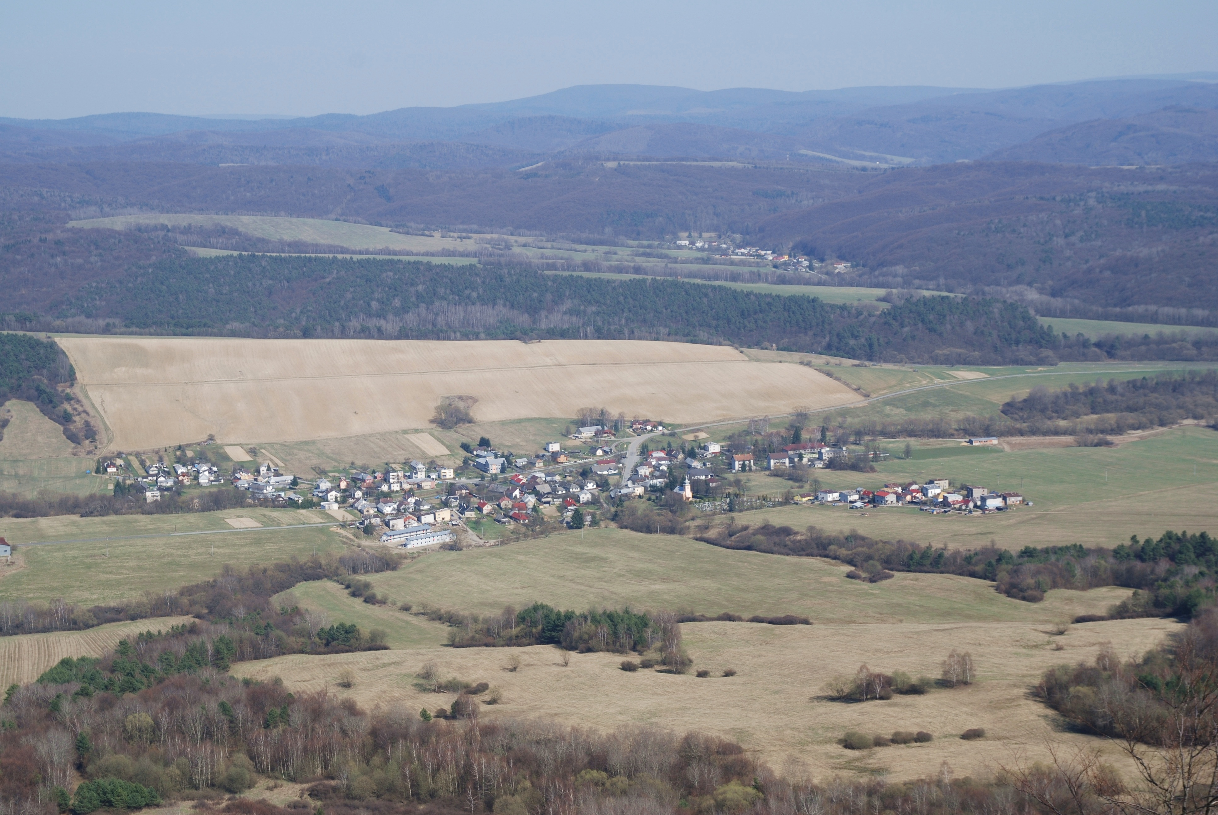 góra Rohuľa